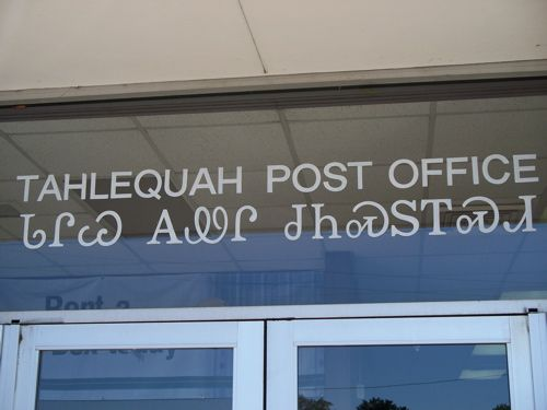 Lluniau o arwyddion dwyieithog (Cherokee/Saeseng) yn Tahlequah, Oklahoma gyda chaniatad Emma Reese Transcription: "TAHLEQUAH POST OFFICE ¦ ᏓᎵᏇ ᎪᏪᎵ ᏧᏂᏍᏚᎢᏍᏗ"